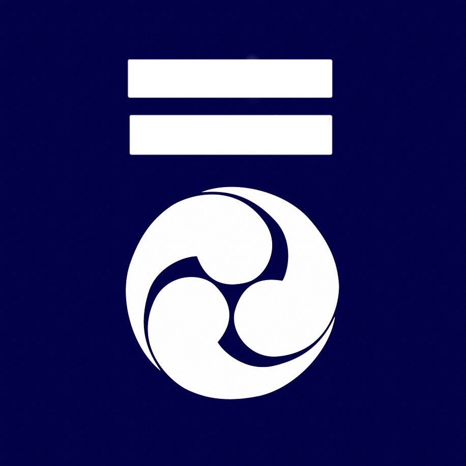 赤松家の家紋の正しいものです。